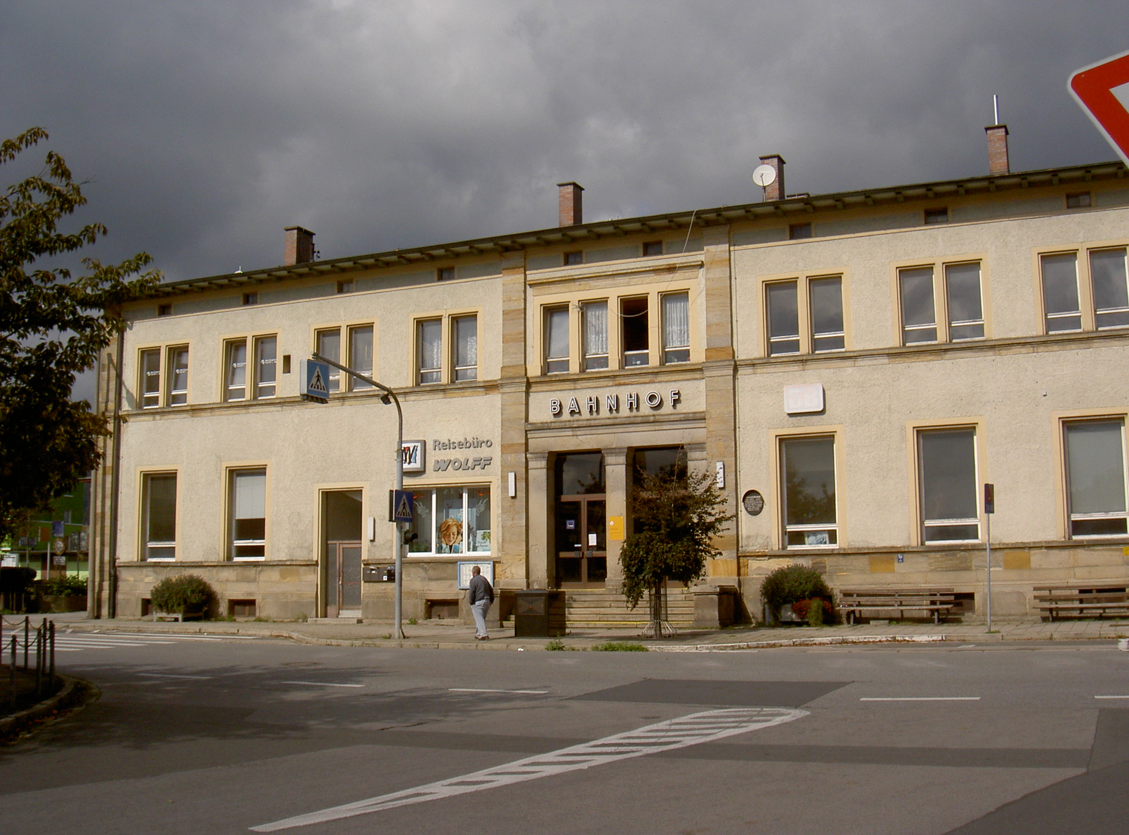 Bahnhof Furth im Wald